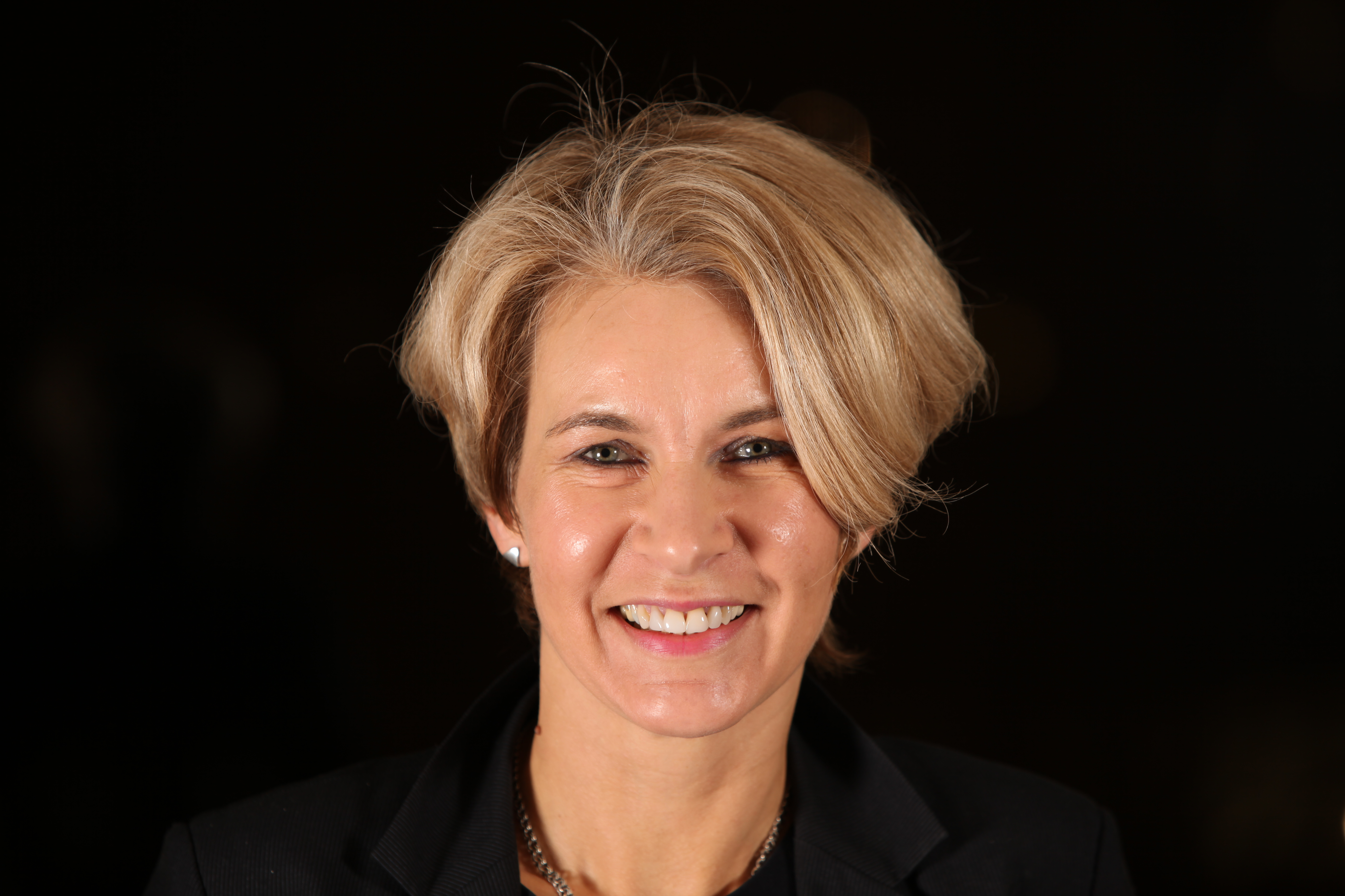 Elke Twesten, Abgeordnete des niedersächsischen Landtages (damals Bündnis90/Die Grünen, jetzt CDU)